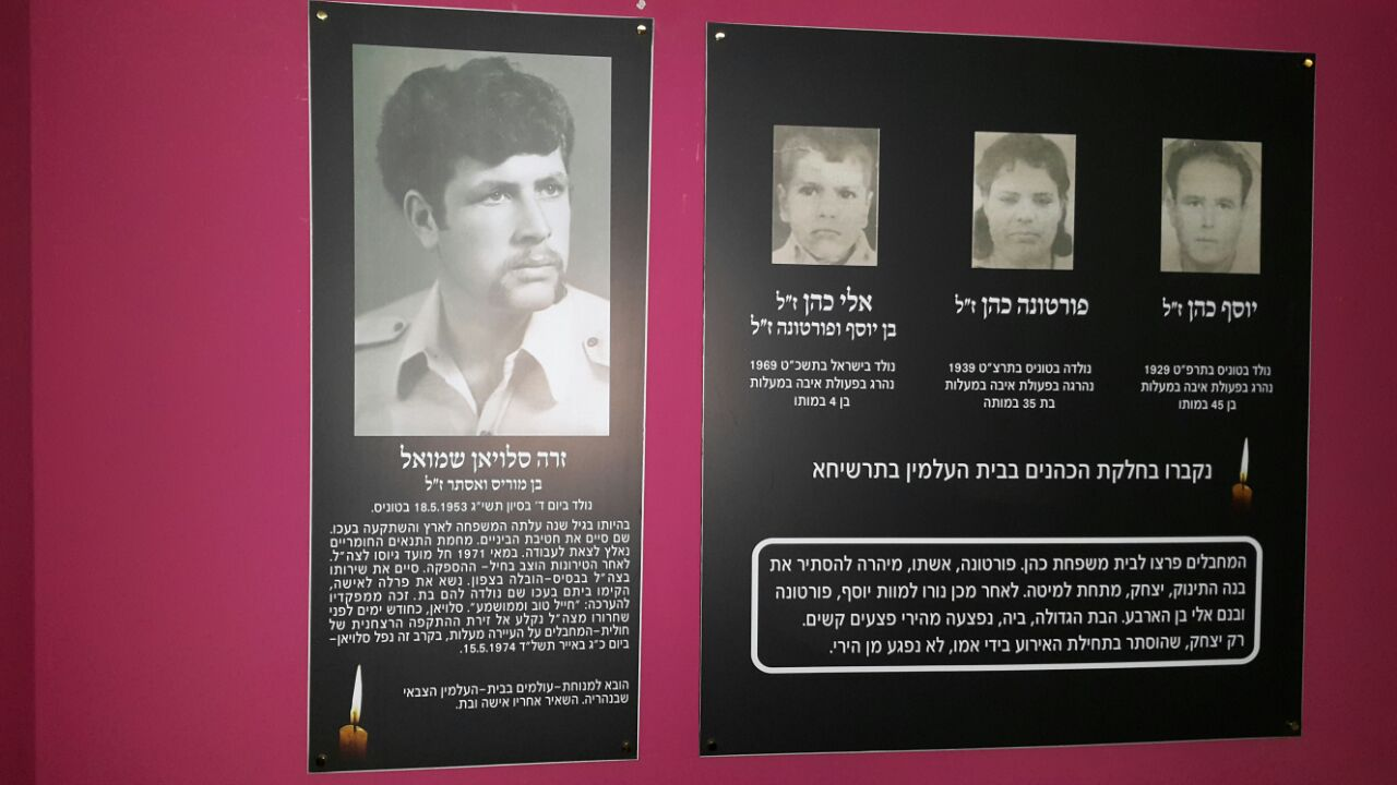 לוח הנצחה למשפחת כהן וסלויאן זרה בבית הספר נתיב מאיר במעלות